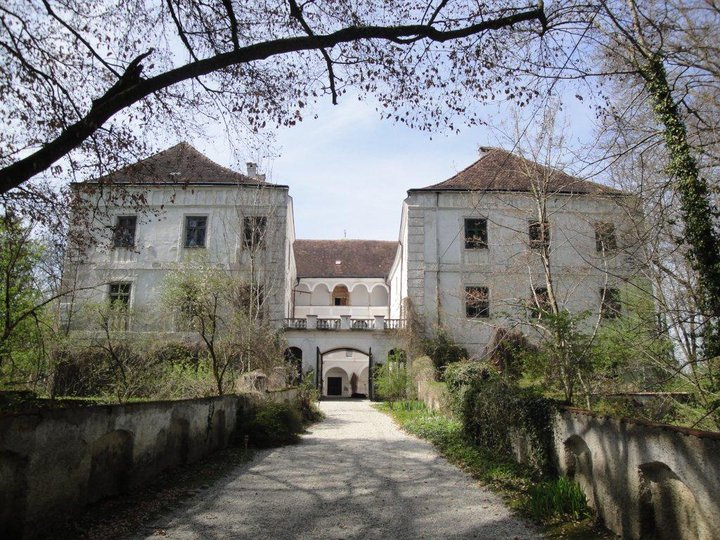 Bild zeigt die Frontansicht des Schlosses Katzenberg